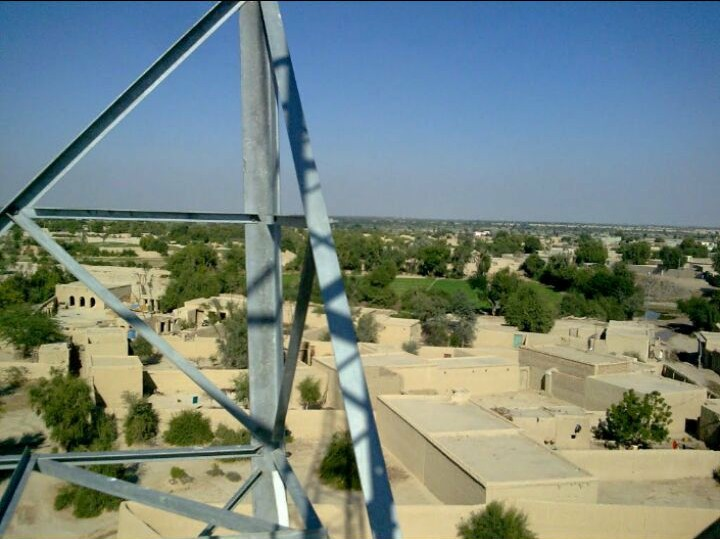 سنڌي: ڊرگھ بالا شهر جو ڏيک